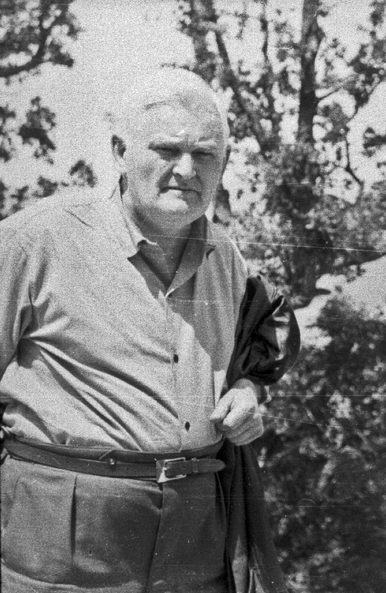 Bolesław Szabelski, podczas pobytu w Jugosławii, 1965. Boleslaw Szabelski during his trip to Yugoslavia